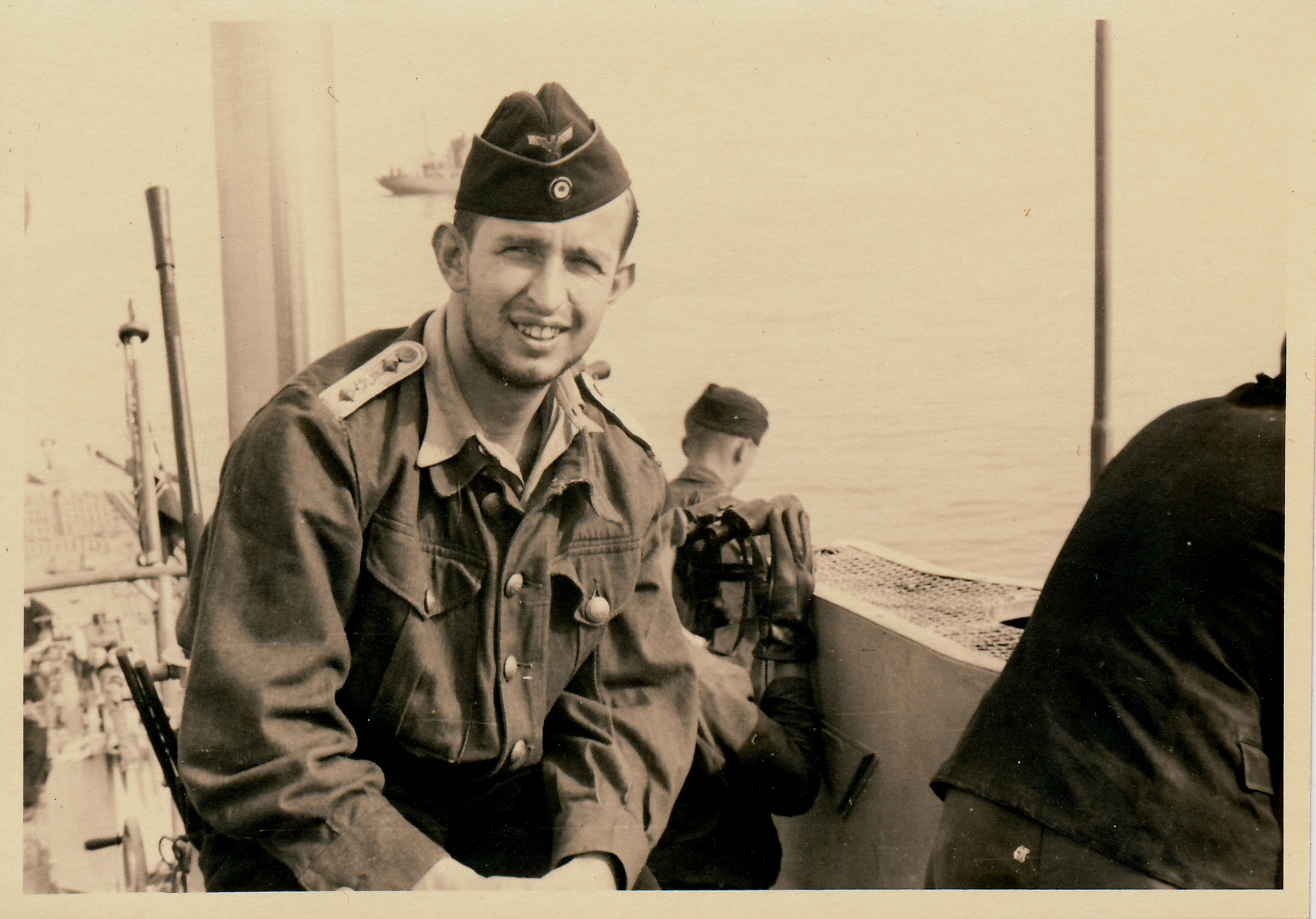 Fotografie von Stabsarzt Dr. Armin Wandel als Bootsarzt auf U 129 der Kriegsmarine